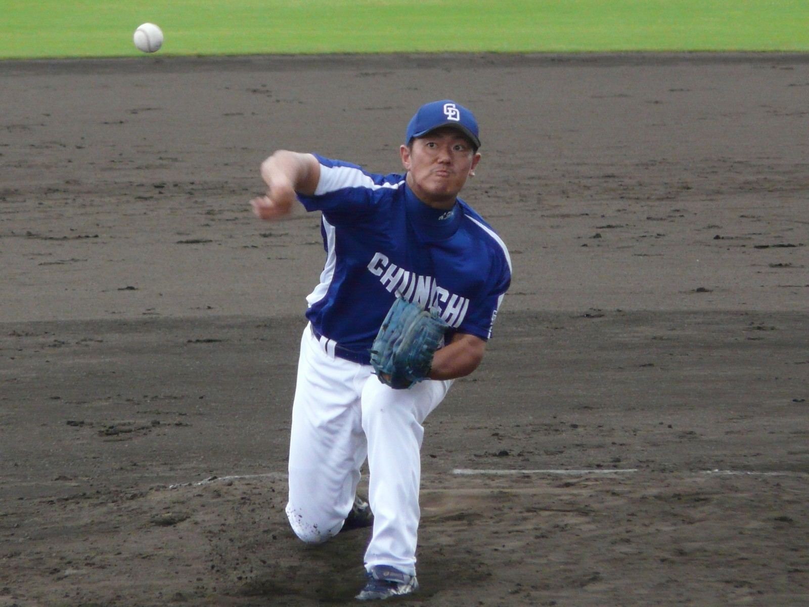 Copied from 画像:CD-Akinobu-Shimizu.jpg: "清水昭信"